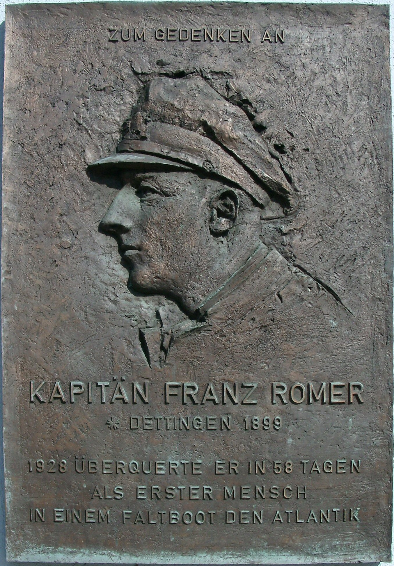 Eine Gedenktafel für Kapitän Franz Romer, angebracht am Rathaus in Dettingen (Deutschland, Konstanz, Bodensee), gelegen an der nach ihm benannten Hauptstraße durch den Ort.